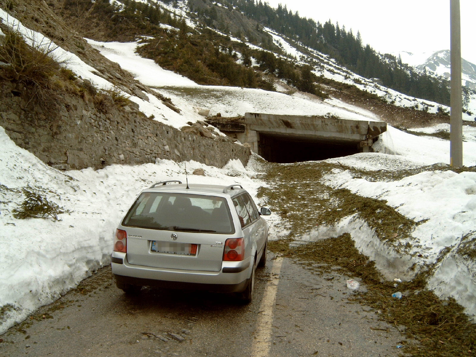 9. April 2005: Die durch eine Lawine blockierte Transfogarascher Hochstraße im Capra-Tal, Nordseite des Tunnels